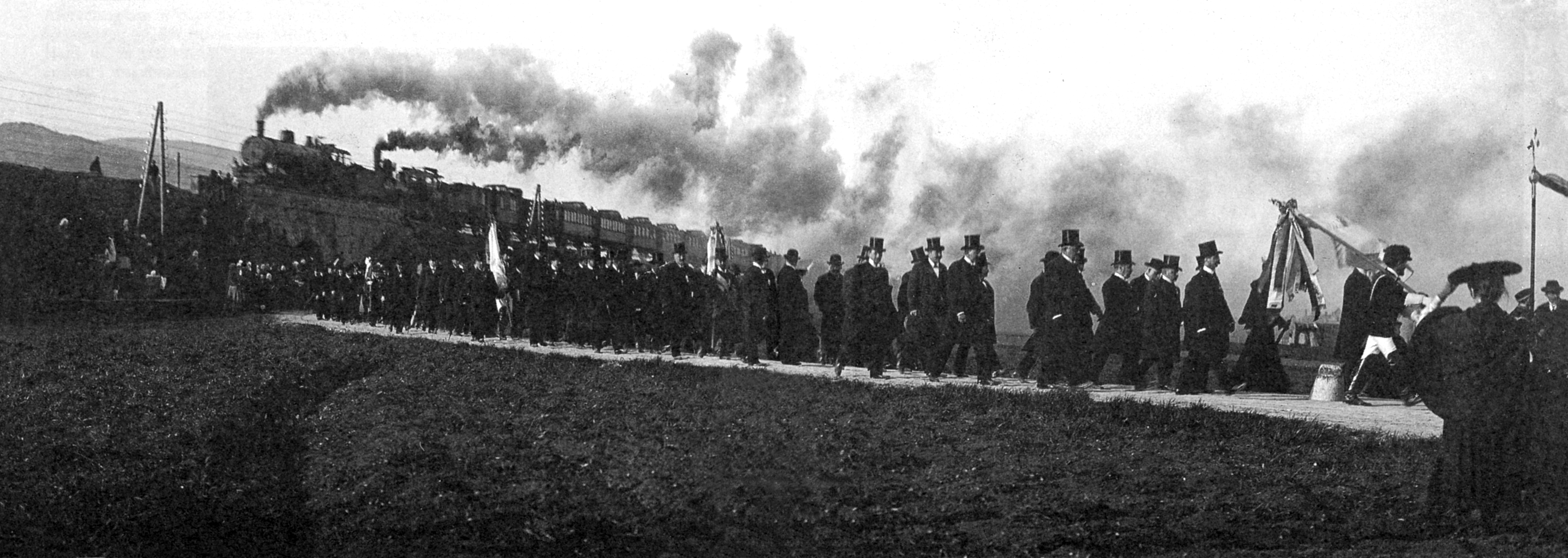 Baden bei Wien, Rudolf-Zöllner-Straße, Trauerkondukt Karl Komzak jun.